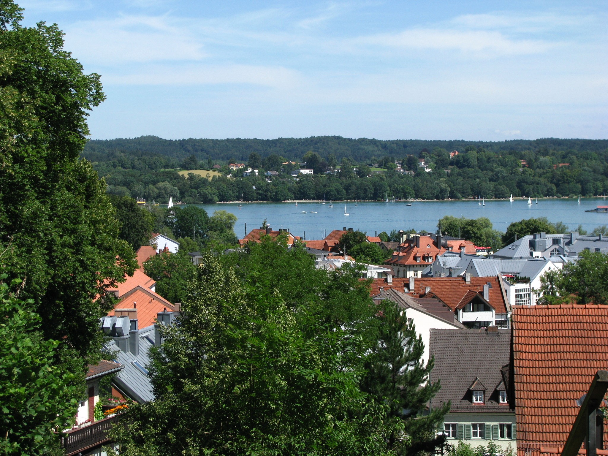 Blick auf Starnberg und das Nordende des Starnberger Sees